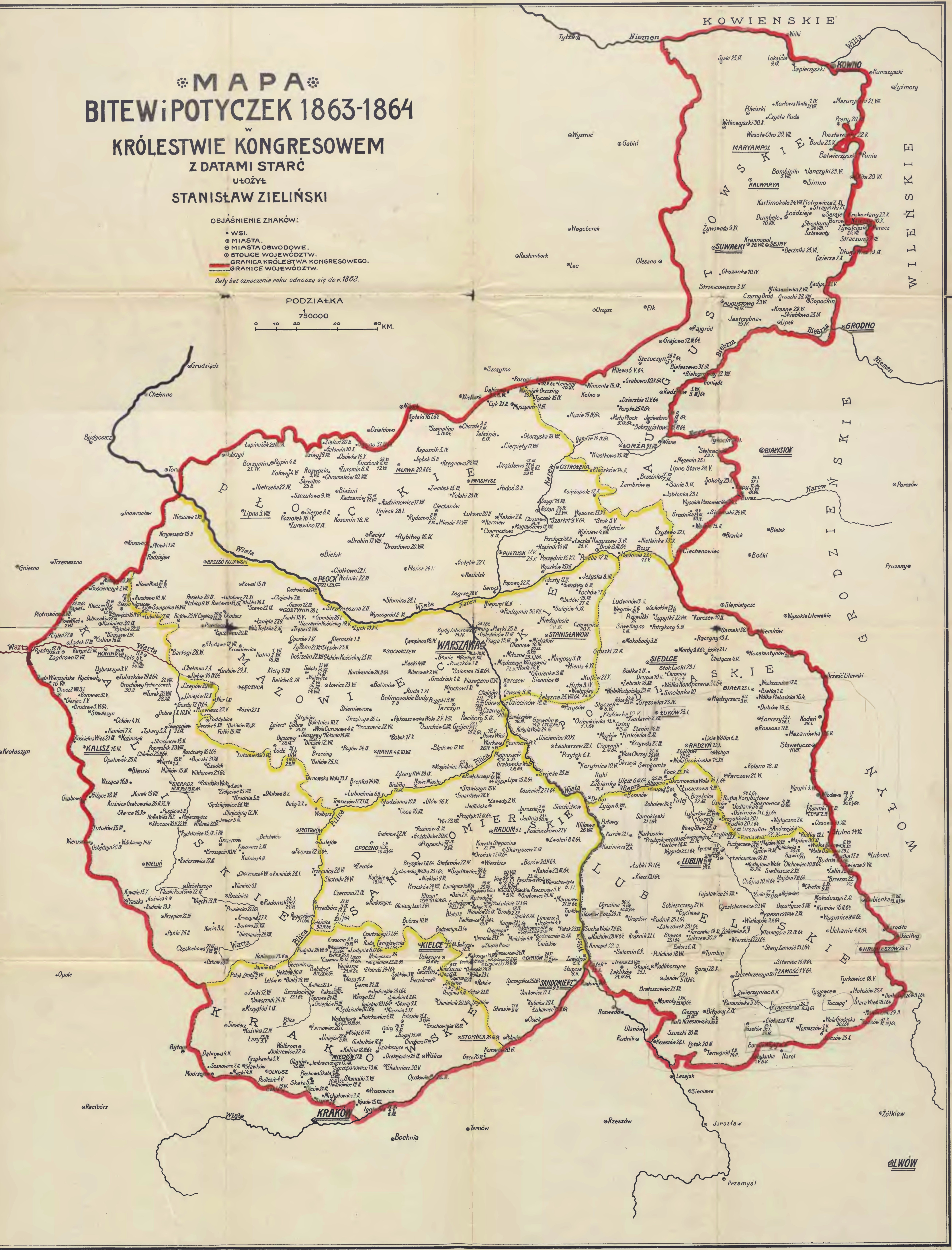 Bitwy Powstania Styczniowego w Królestwie Kongresowym. en. Battles of January Uprising in Congress Poland.